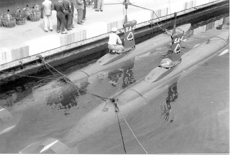 Minisubmarinos de ataque españoles Foca I (SA-41) y Foca II (SA-42), de la clase Foca, en Cartagena.